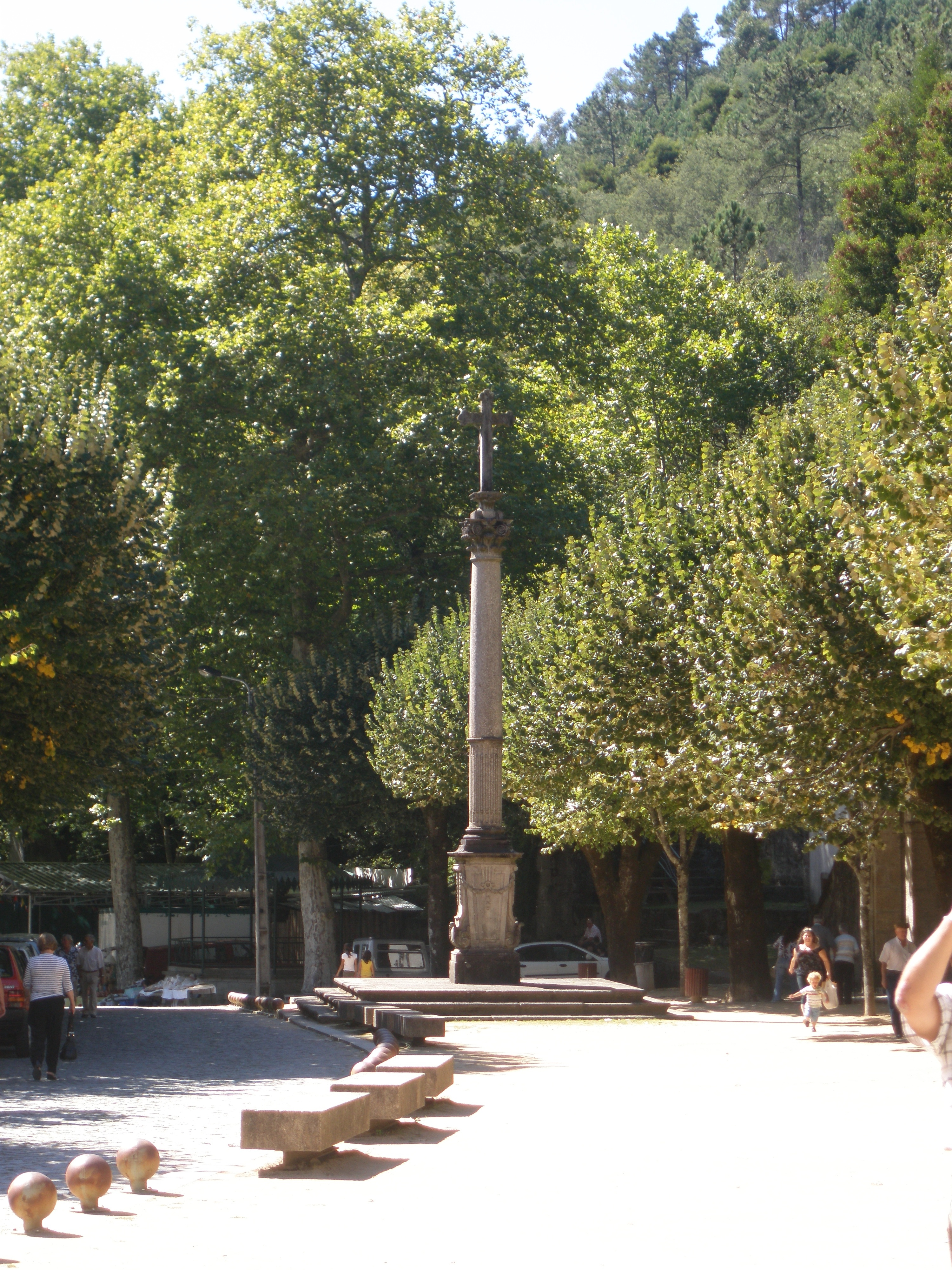 Imponente cruzeiro junto ao Santuário de Nossa Senhora da Abadia